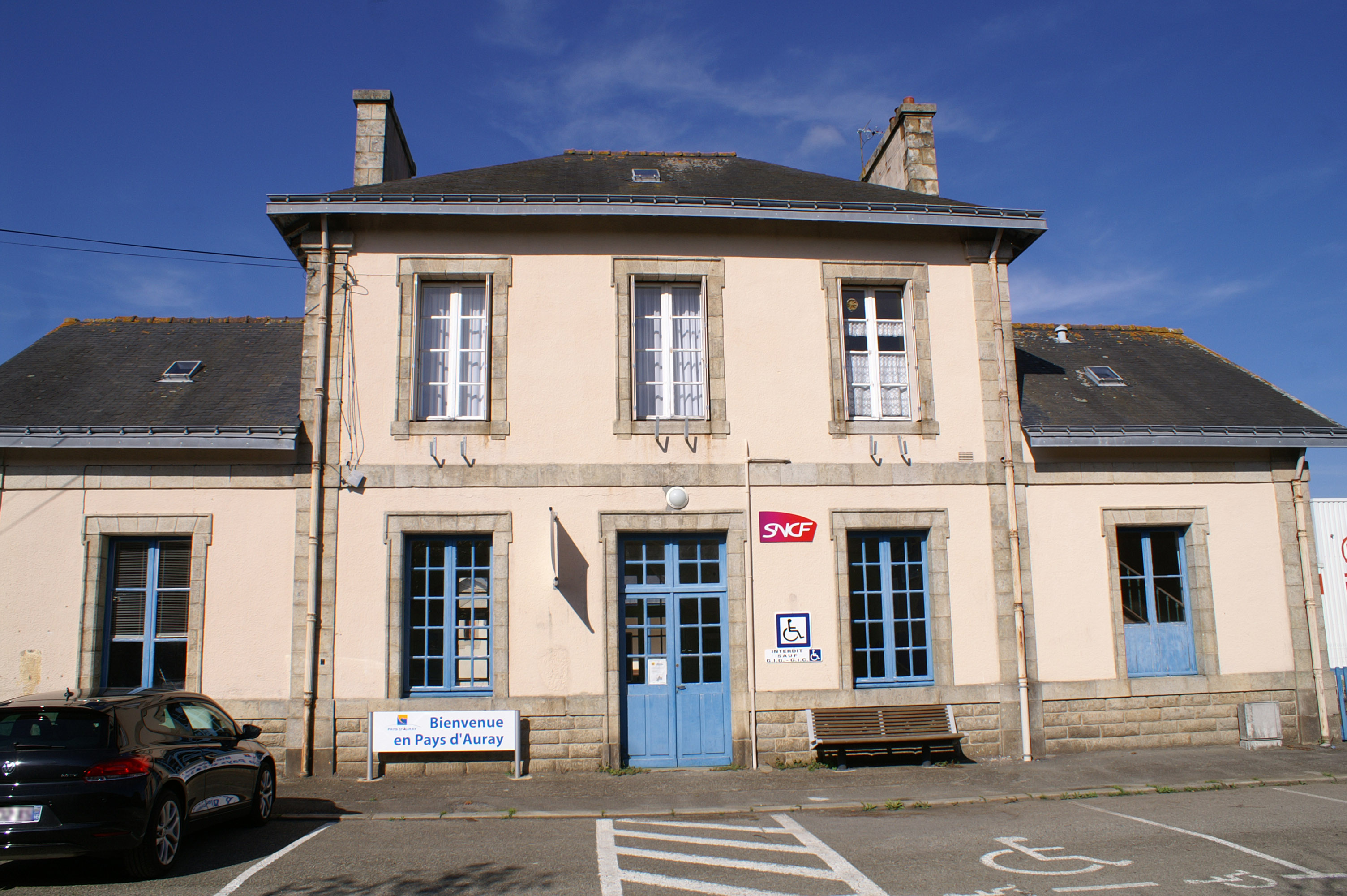 Le bâtiment voyageurs de la gare de Plouharnel-Carnac sur la commune de Plouharnel dans le Morbihan.